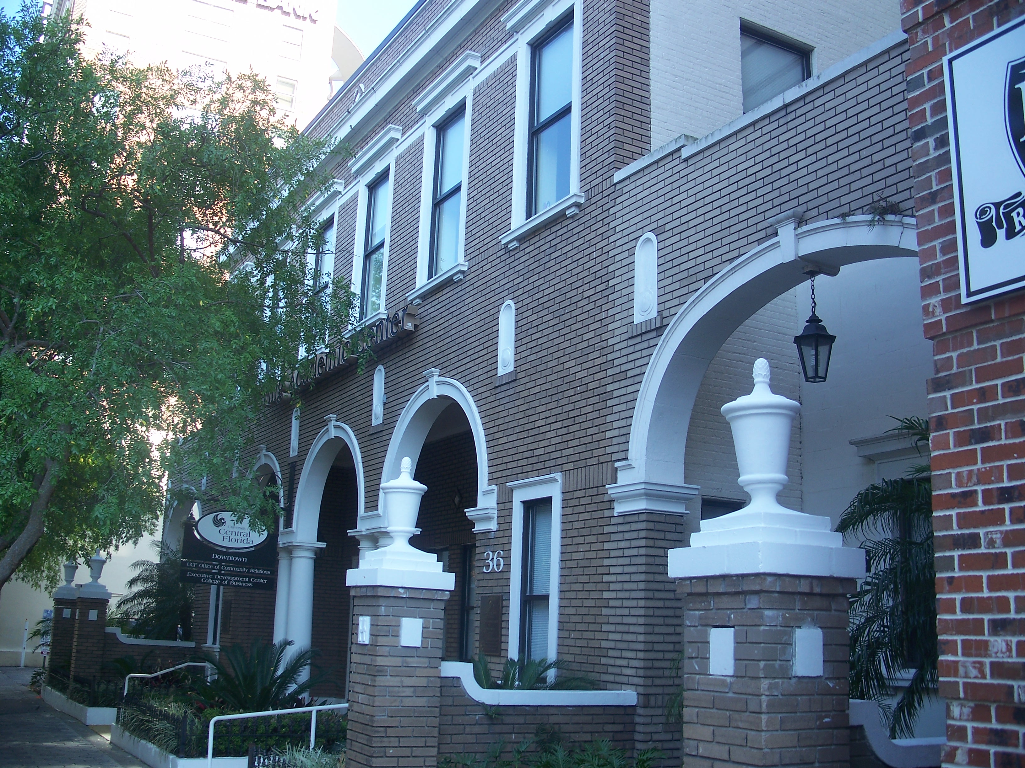 Orlando, Florida: UCF Academic Center